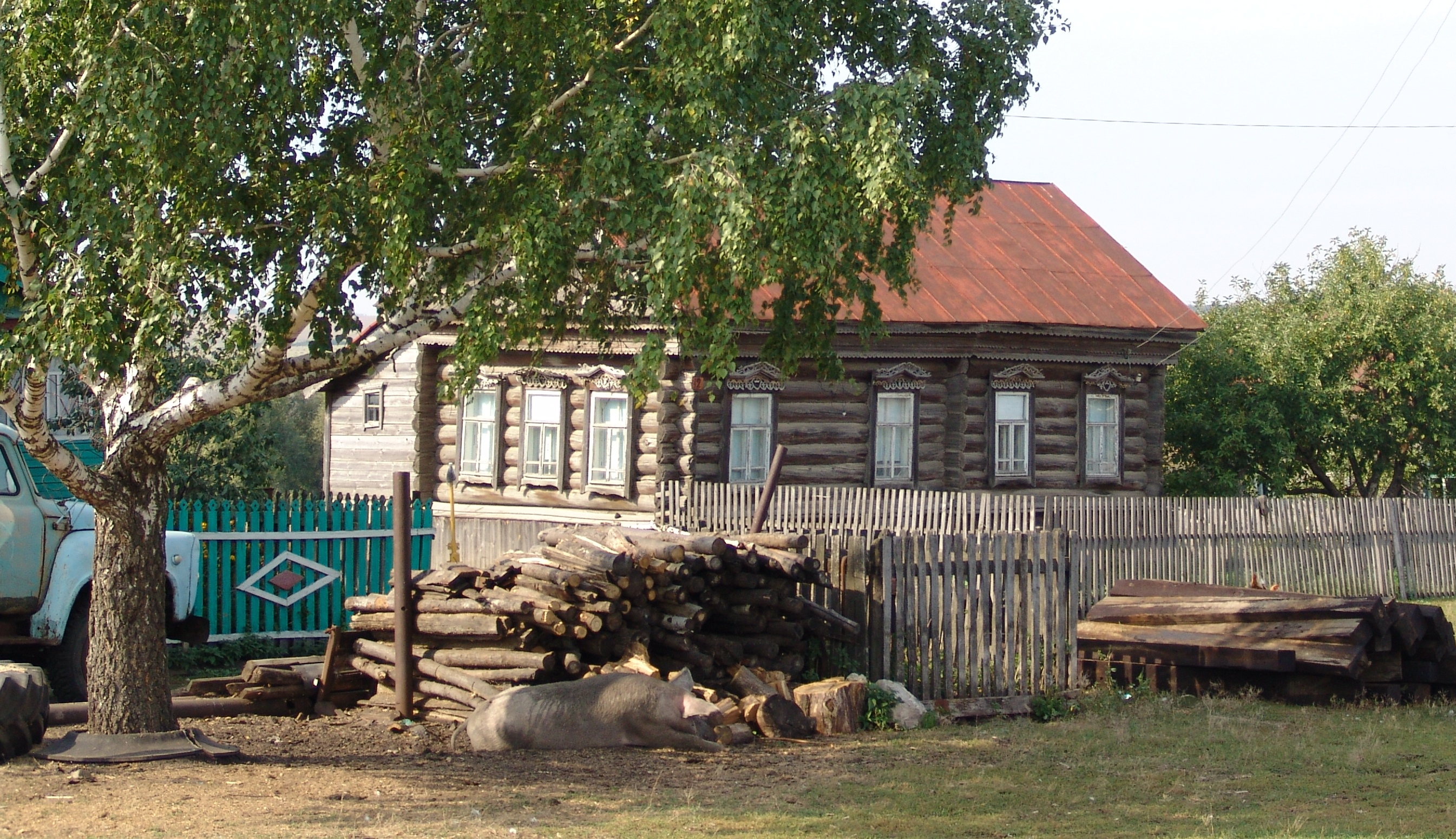 Село Тайдаково. Сельский пейзаж.